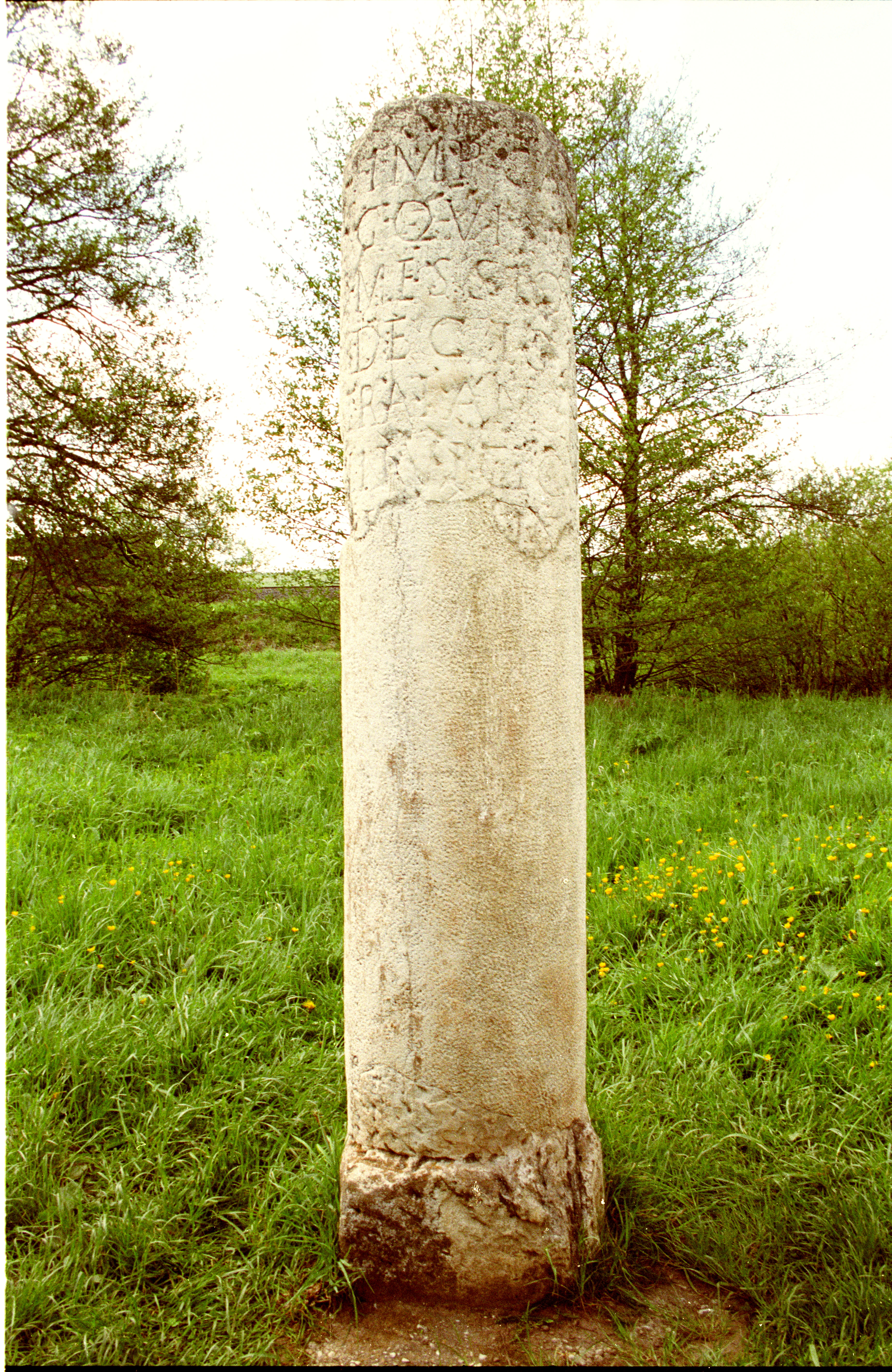 Rekonstruktion und Römischer Meilenstein im Steinrütsch bei Nettersheim.Original at Bonn, Rhein. Landesmus. Other copy at archaeological park Xanten.Epigraphische Datenbank Heidelberg HD014806. Weitere Fotos F001718 F004097 F004135 F018886 F018887 F018888.